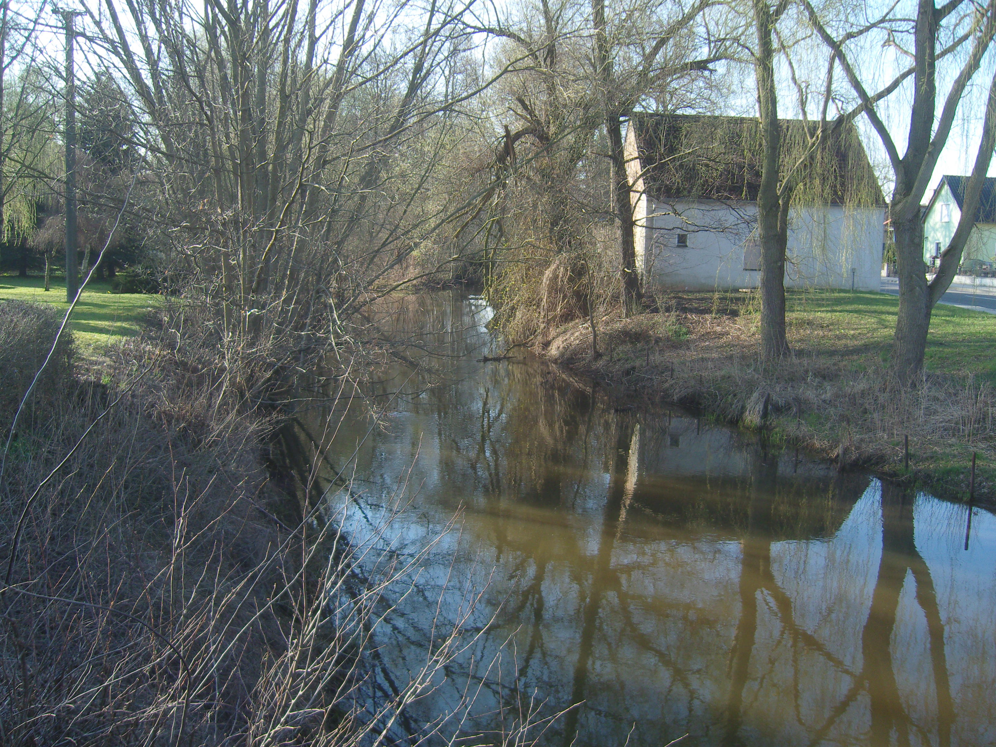 Das Ruhlander Schwarzwasser in Jannowitz.